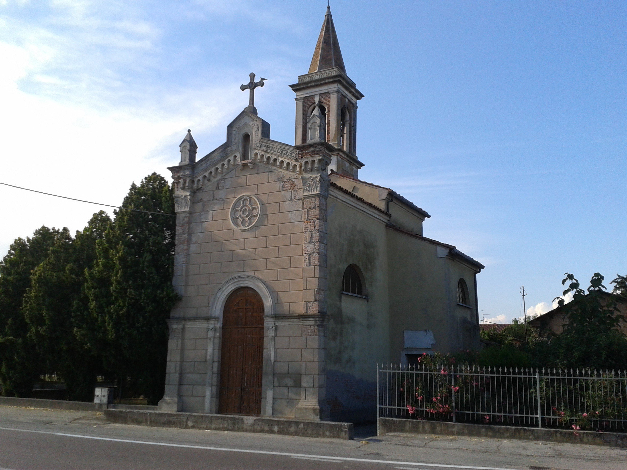 Foto della Chiesa di Santo Stefano di Minerbe